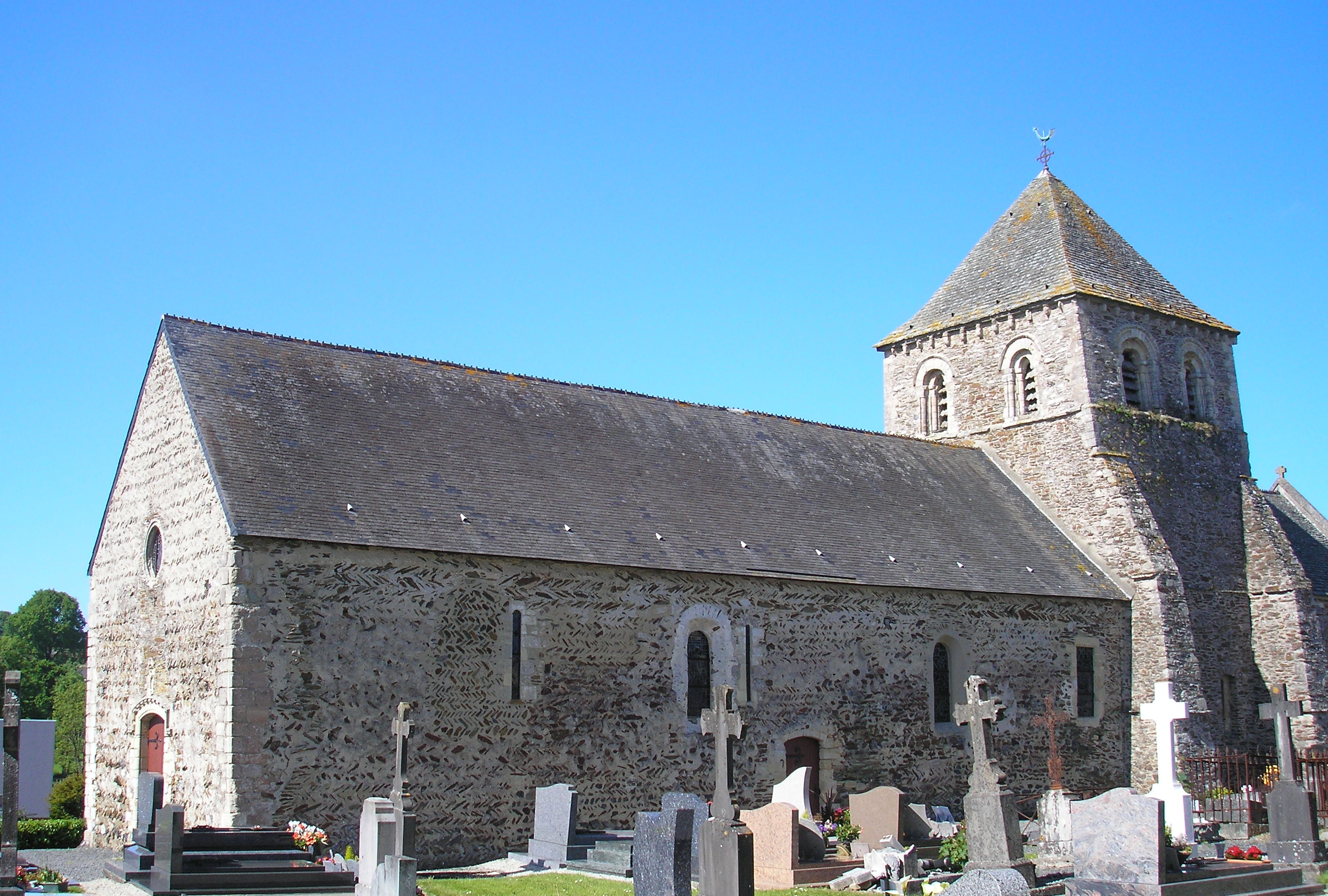 La Barre-de-Semilly (Normandie, France). L'église Saint-Ébremond.